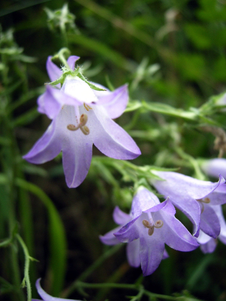 Subclassis: Asteridae - Ordo: Asterales - Familia: Campanulaceae - Subfamilia: Campanuloideae - Genus: Campanula L. Species: Campanula sibirica L.